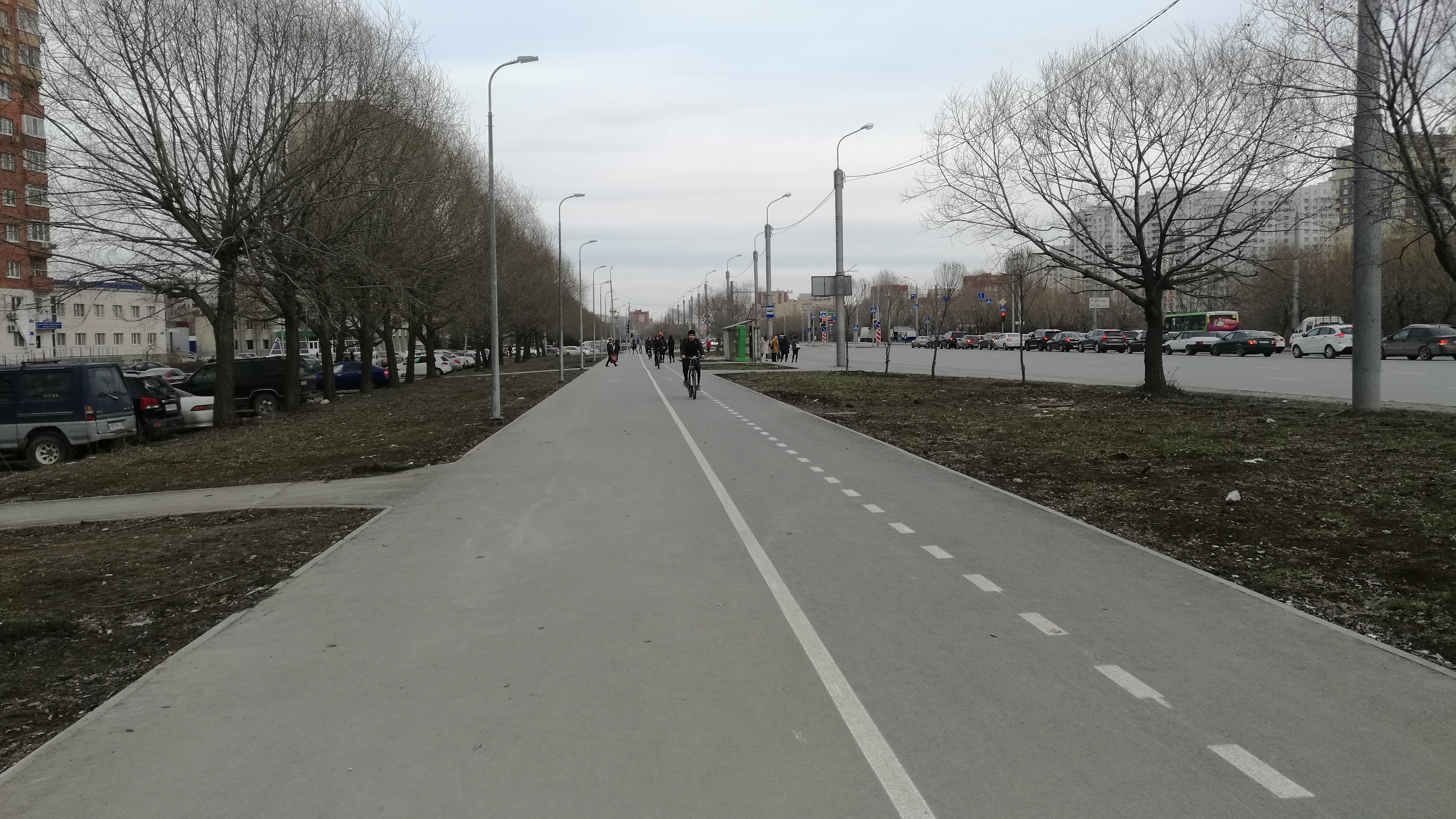 Biciklejo en strato Ŝirotnaja. Tjumeno, Rusio.